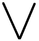 Tamga of the Turkmen Kayi tribe as per Abul-Ghazi's "Genealogy of the Turkmens"